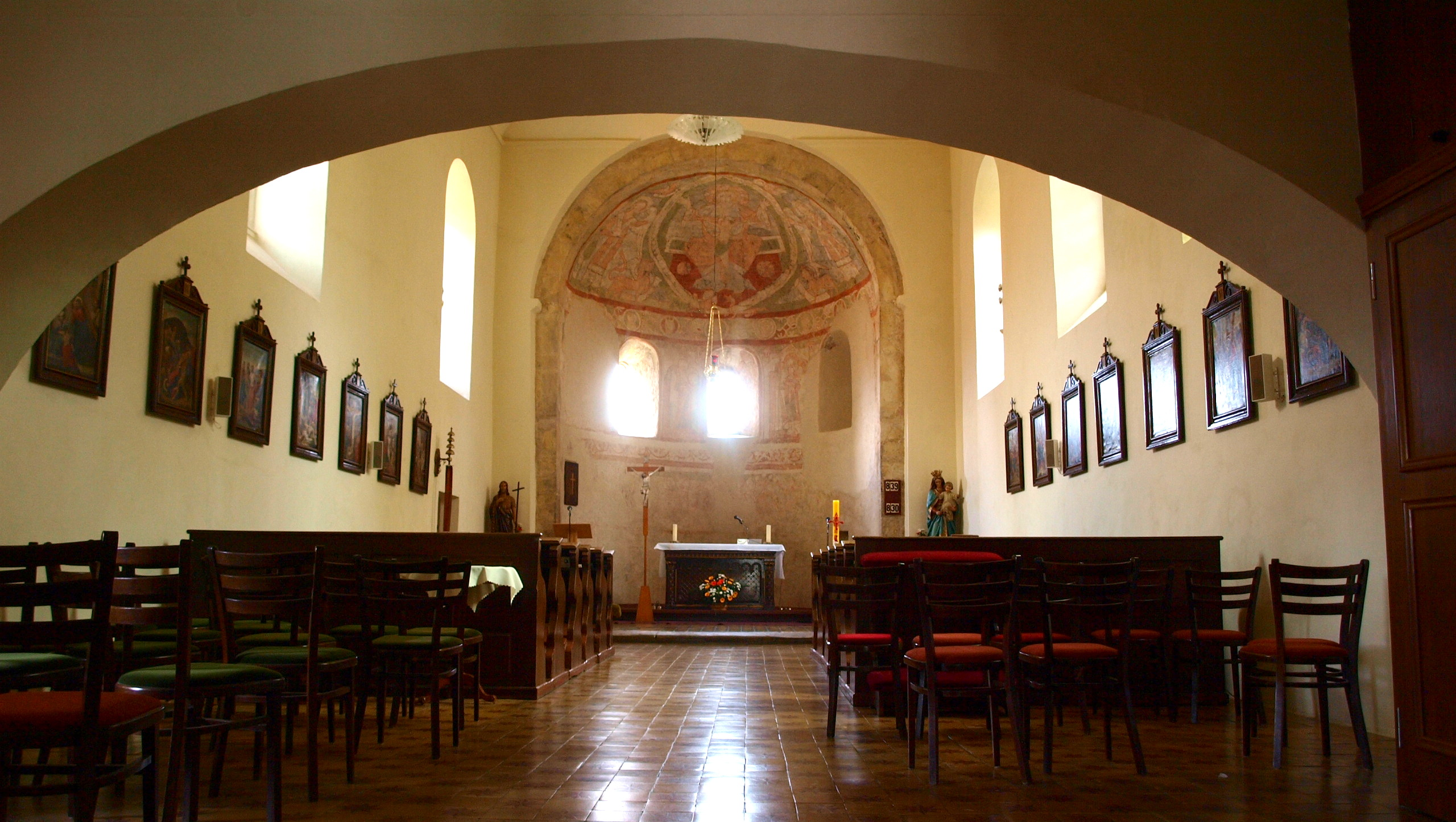 kostel Stětí sv. Jana v Hostivaři